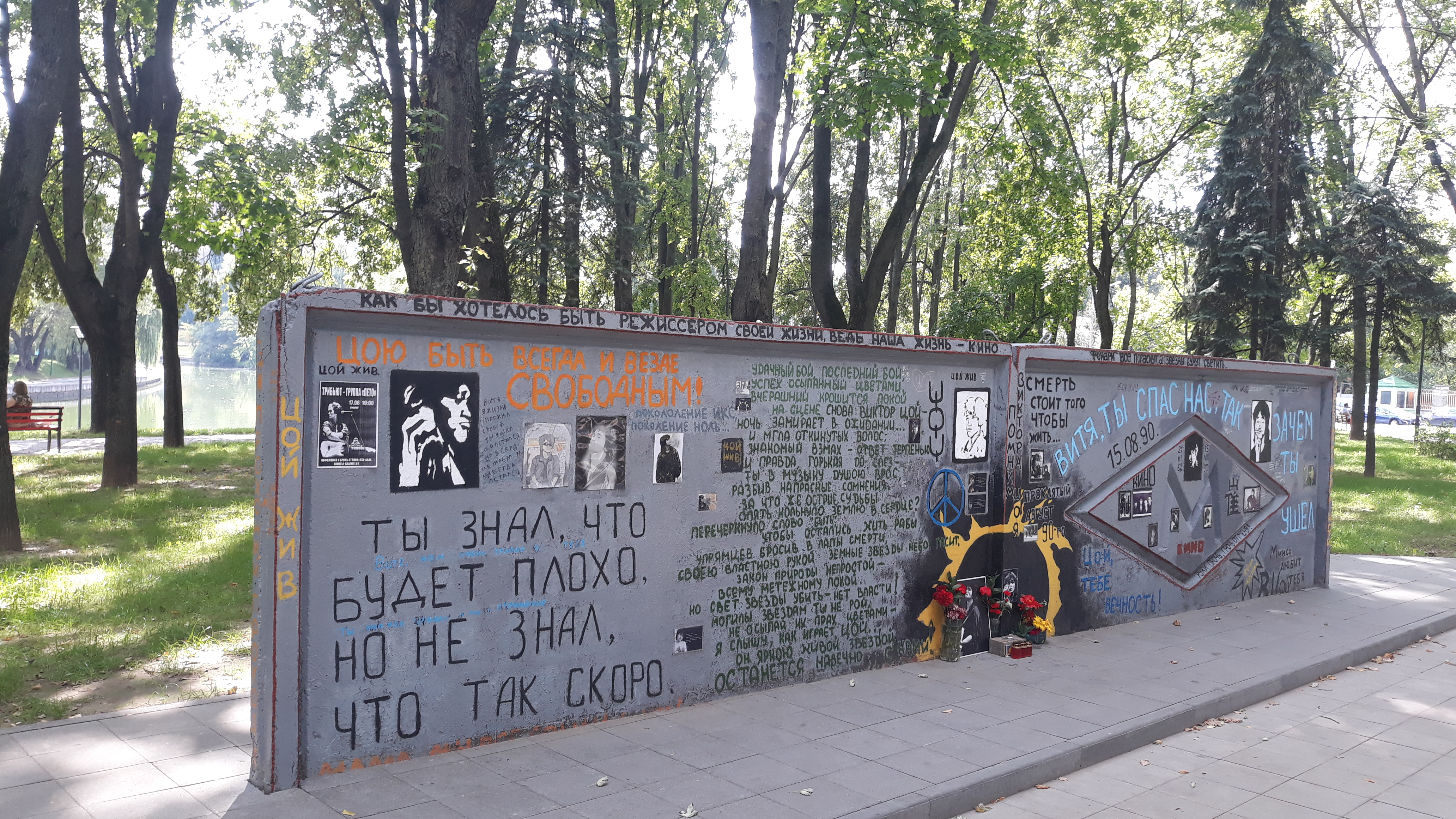 памятник